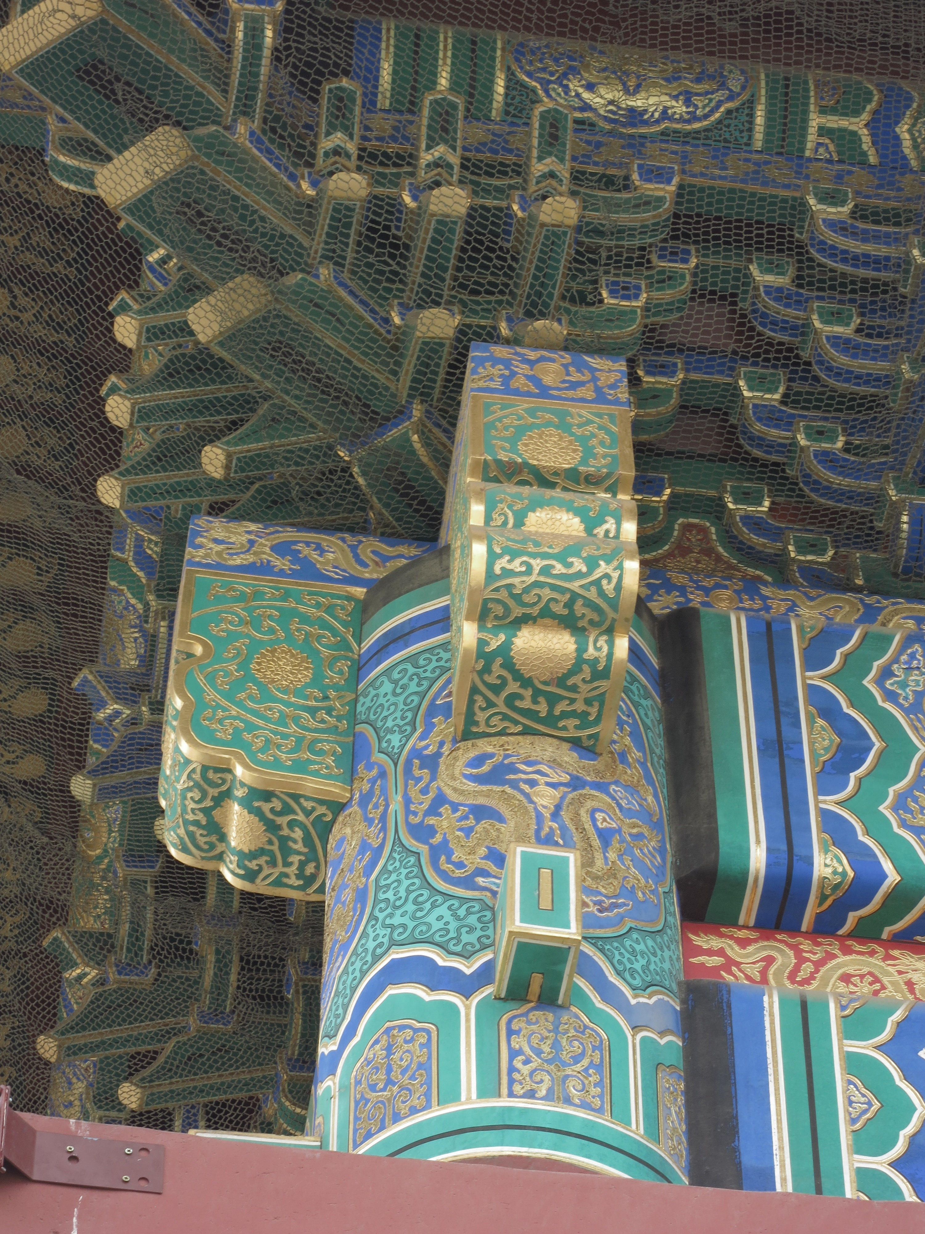 故宮太和殿的轉角柱頭榫卯結構